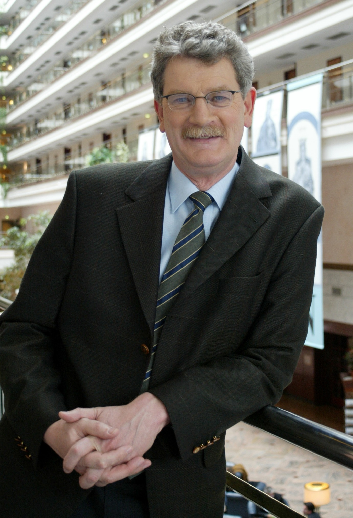 Ein Portrait von Hans-Michael Goldmann, MdB (FDP)